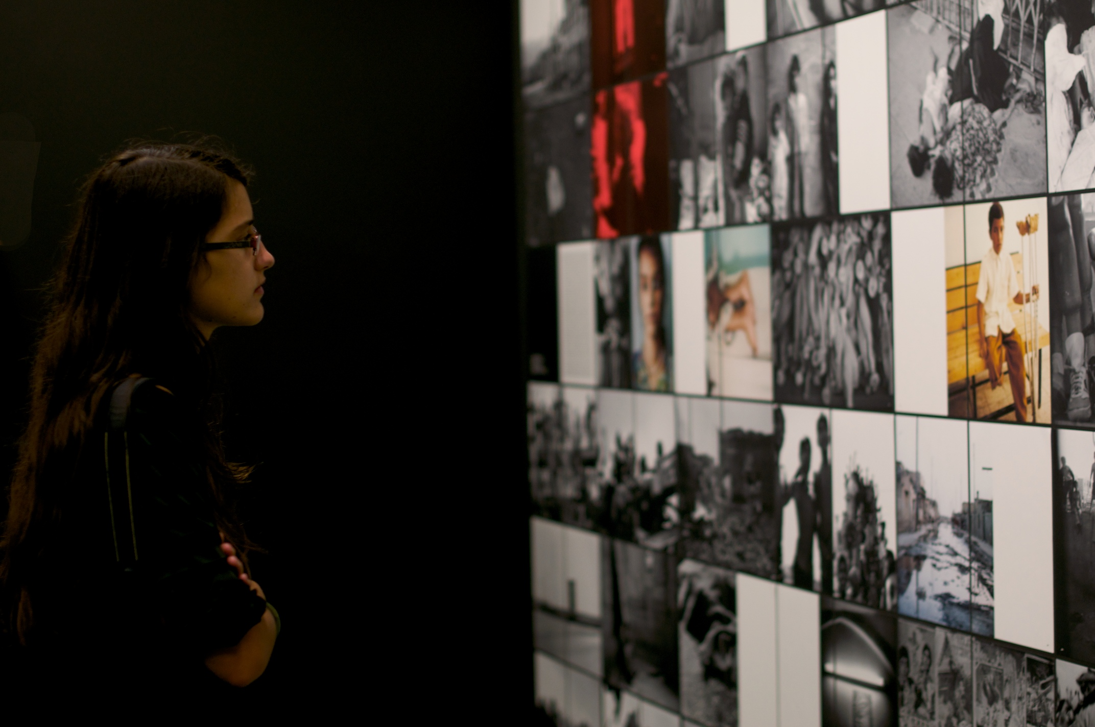 Zurich, 2009